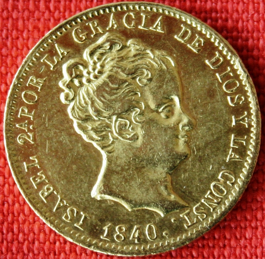 80 Reales Göldmünze von 1840 mit Isabella II. Barcelona, 5,91 Feingold, geprägt nach den Normen der LMU